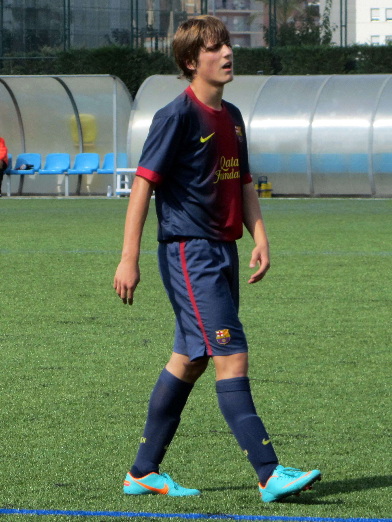 Foto realizada por Javier Segura (@castroquini)